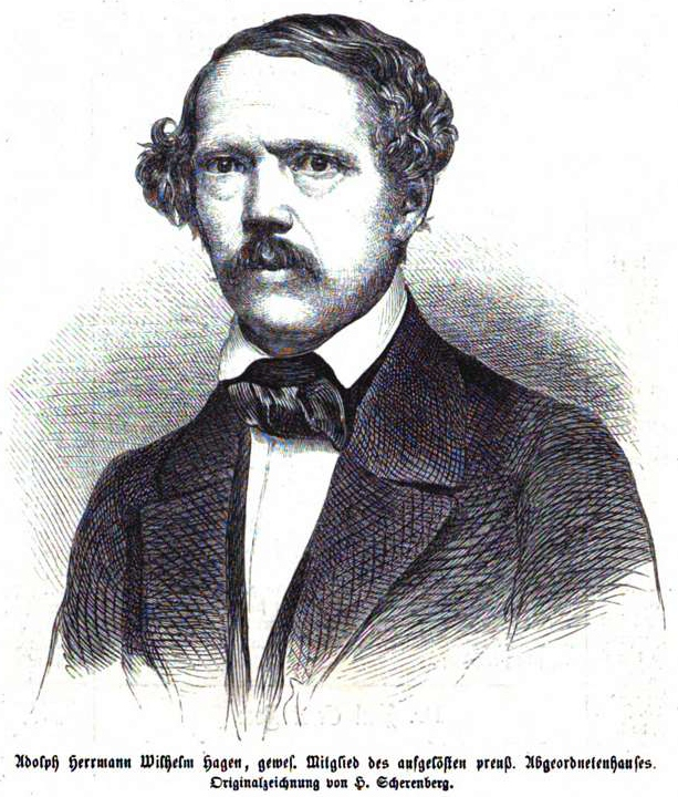 Adolf Hermann Wilhelm Hagen, preußischer Abgeordneter, 1862.